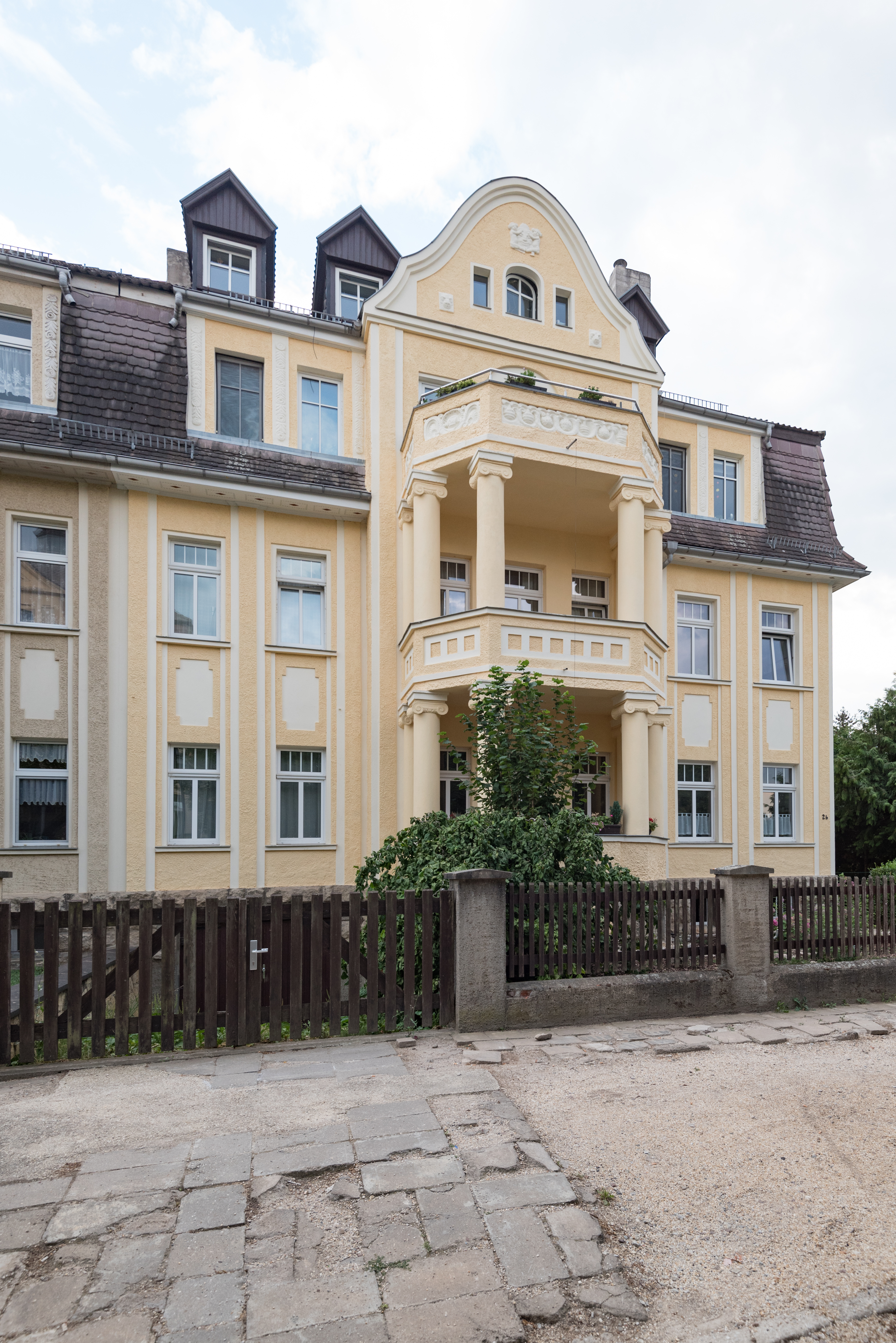 Naumburg (Saale), Theodor-Körner-Straße 2b